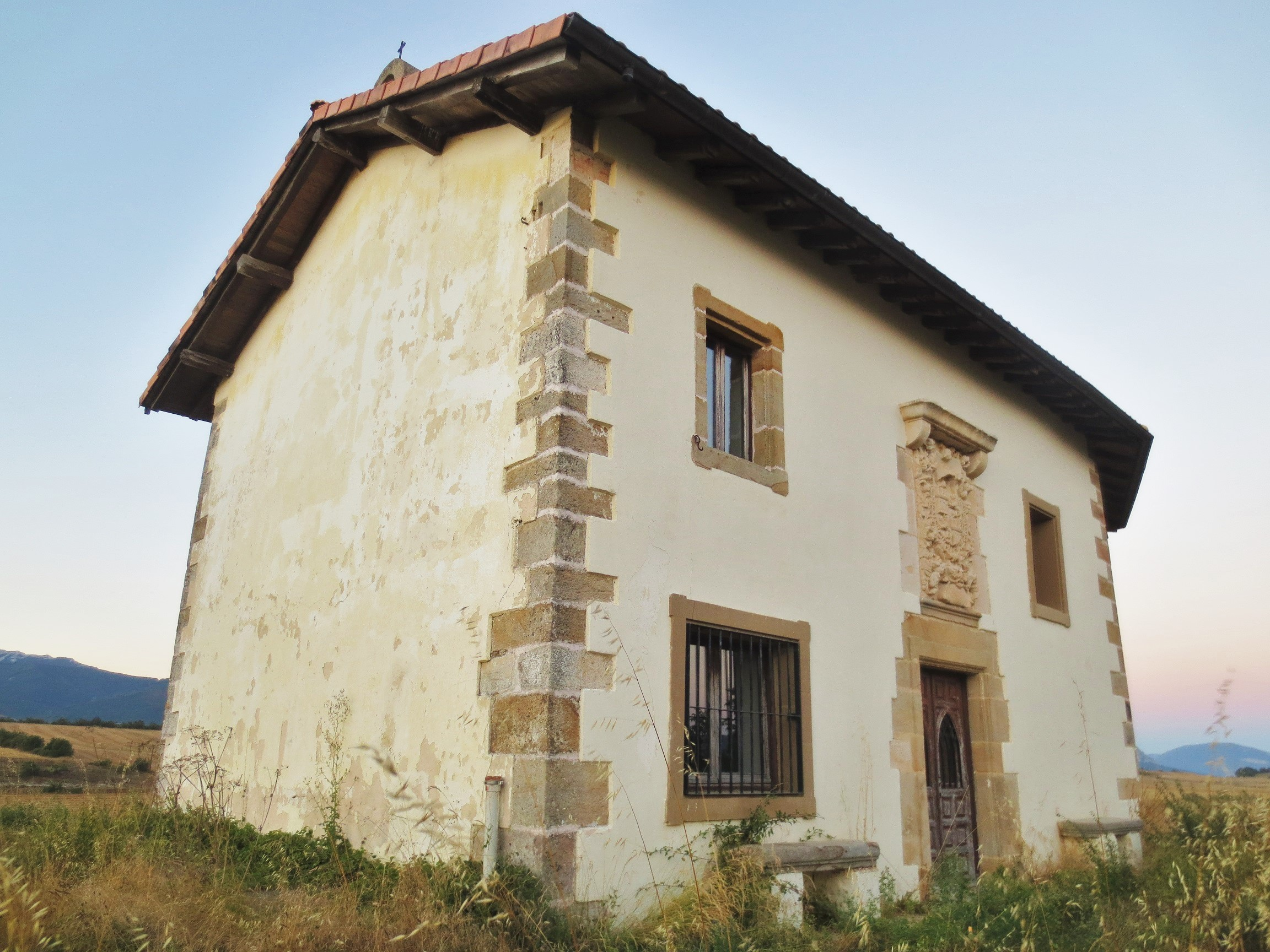 Done Milian ermita Erdoña Araban